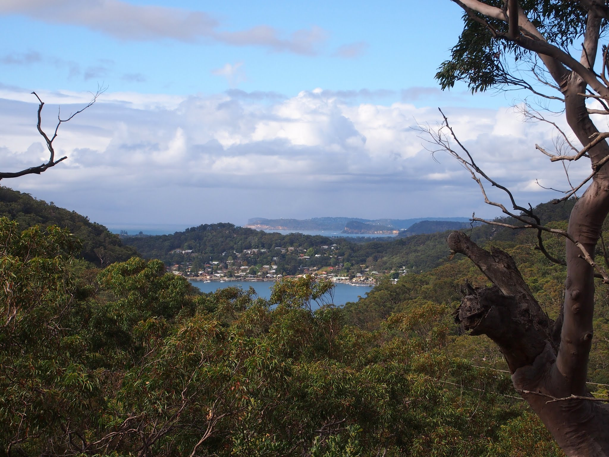 Koolewong Ridge